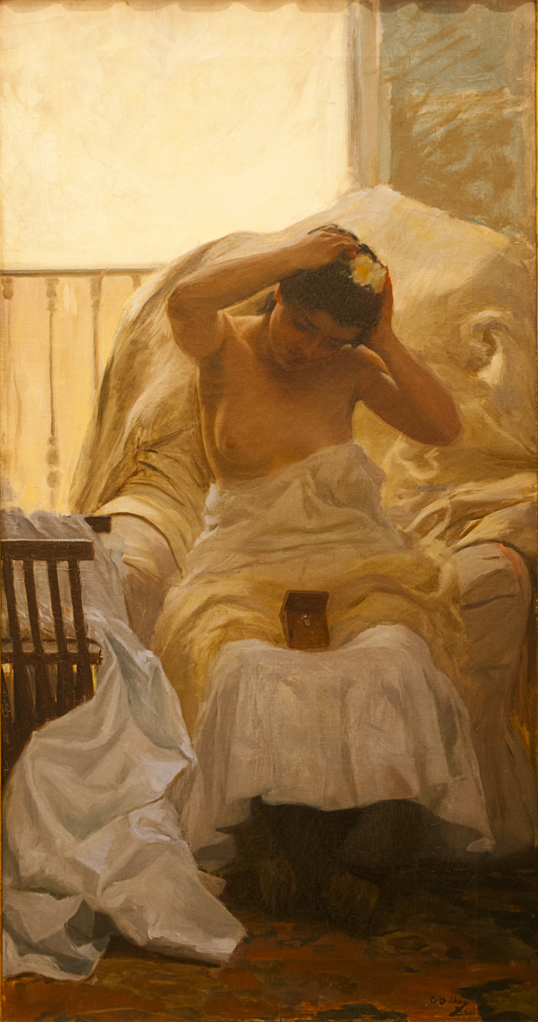 La Toilette (Altura = 98 cm; Anchura = 52 cm). Cuadro de Gonzalo Bilbao. (1911). Museo de Bellas Artes de Sevilla.